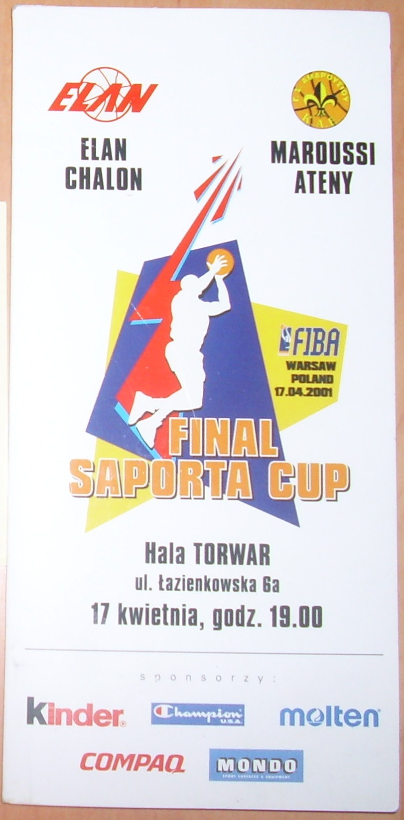 Pass de la finale de la Coupe Saporta 2001 à Varsovie (Elan Chalon - Marrousi Athènes), pouvant contenir le billet de match, le billet d'avion...